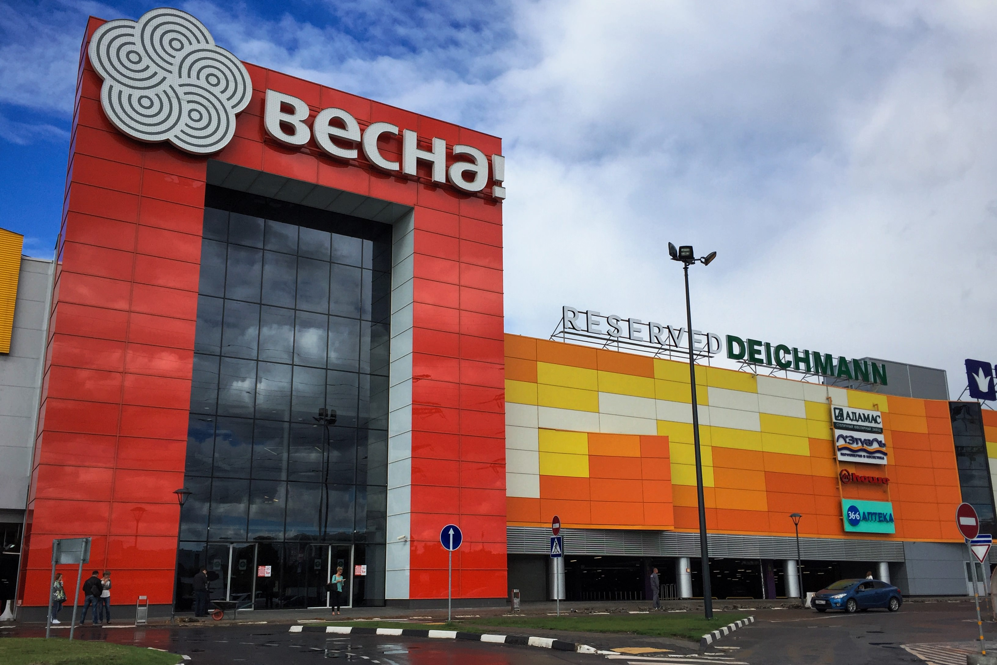 МКАД. Торговый центр «Весна» Moscow in 2016; Москва в 2016